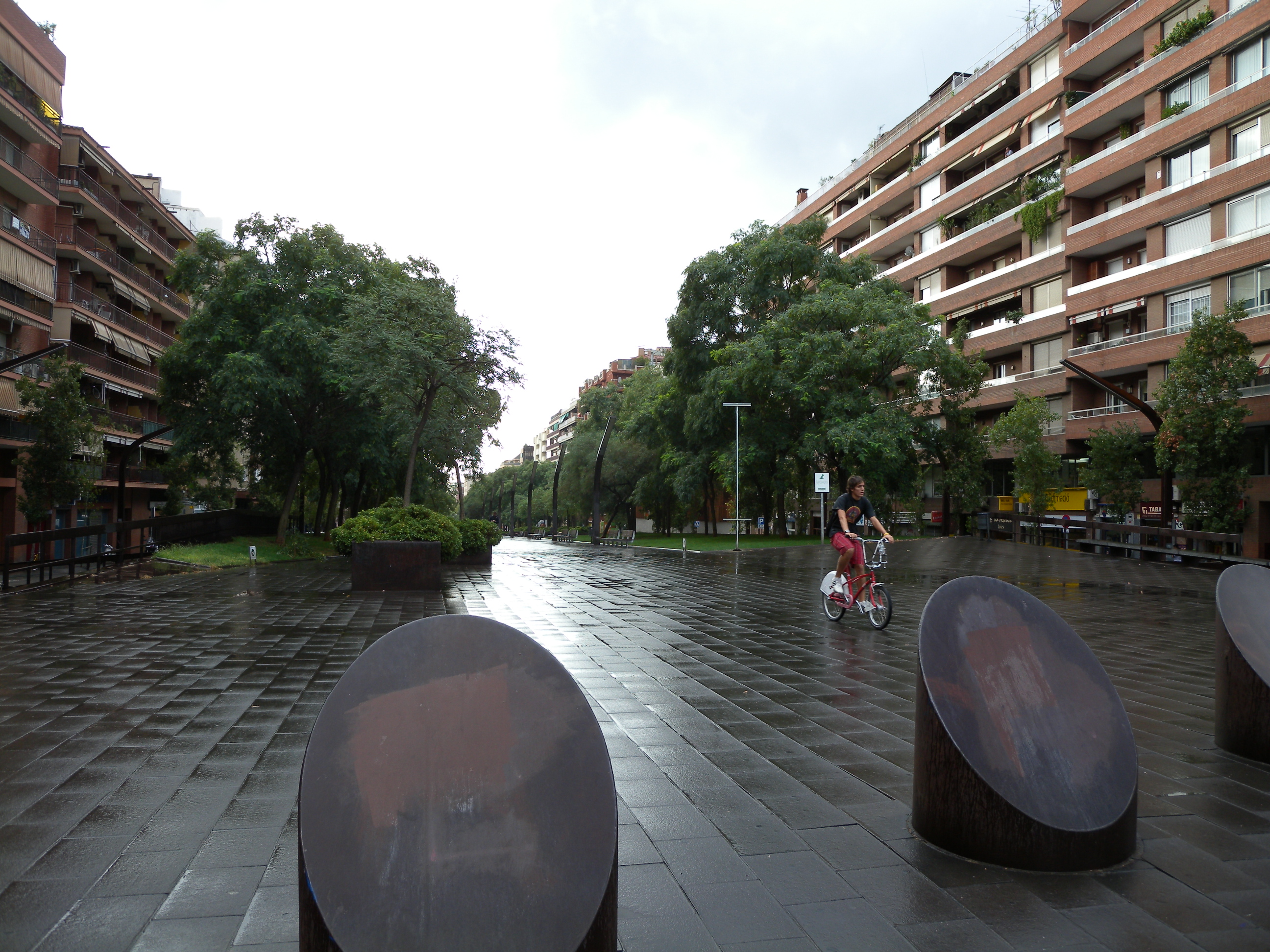 Rambla de Brasil, seen from Av. de Madrid, Barcelona